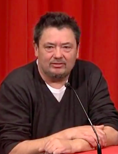 Lutz Dammbeck, 22. November 2015 im Kino des Deutschen Filmmuseums Frankfurt anlässlich einer Filmführung seines Films "Overgames"